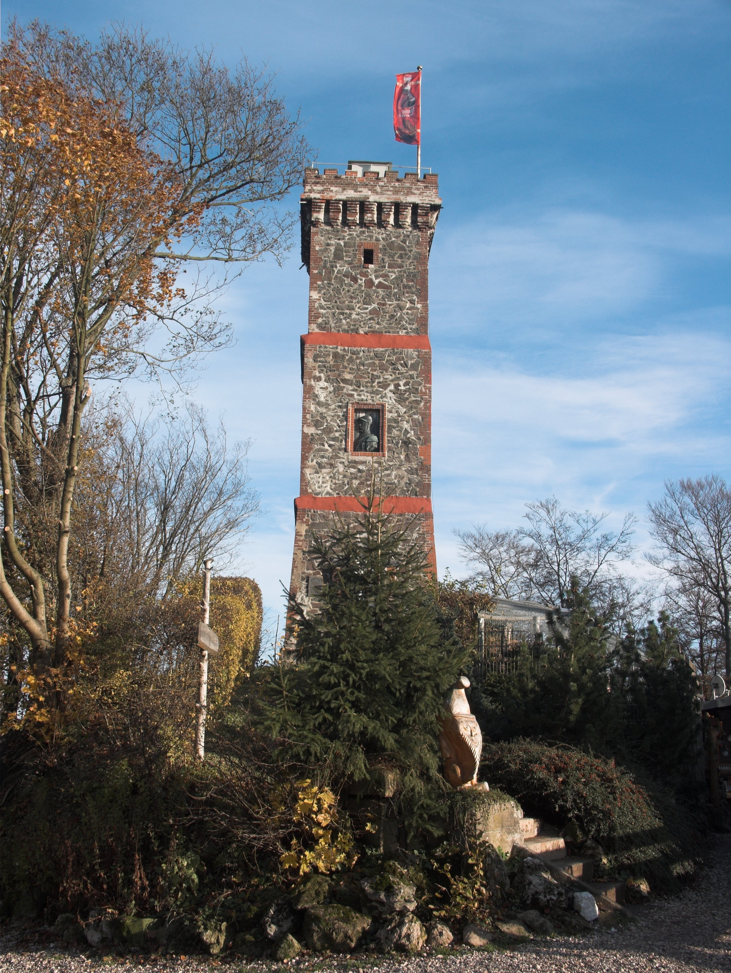 Westseite des Bismarckturms in Bad Lauterberg